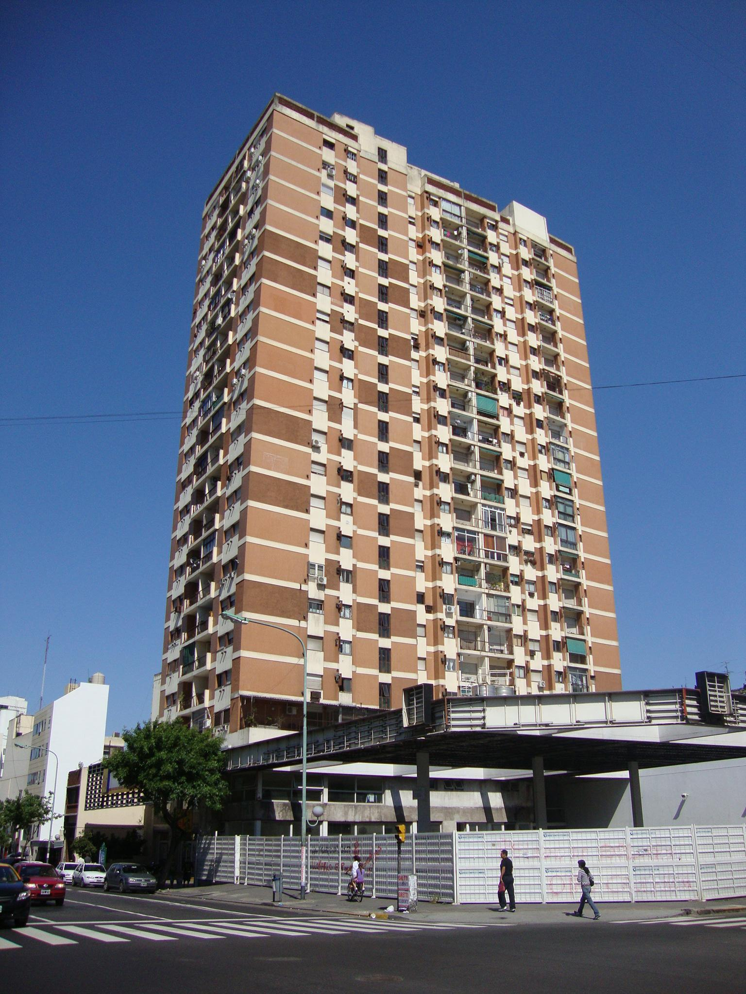 Edificio Arturo Ravina, construido por la cooperativa socialista de vivienda "El Hogar Obrero" en 1977. Avenida Independencia 456, Buenos Aires.